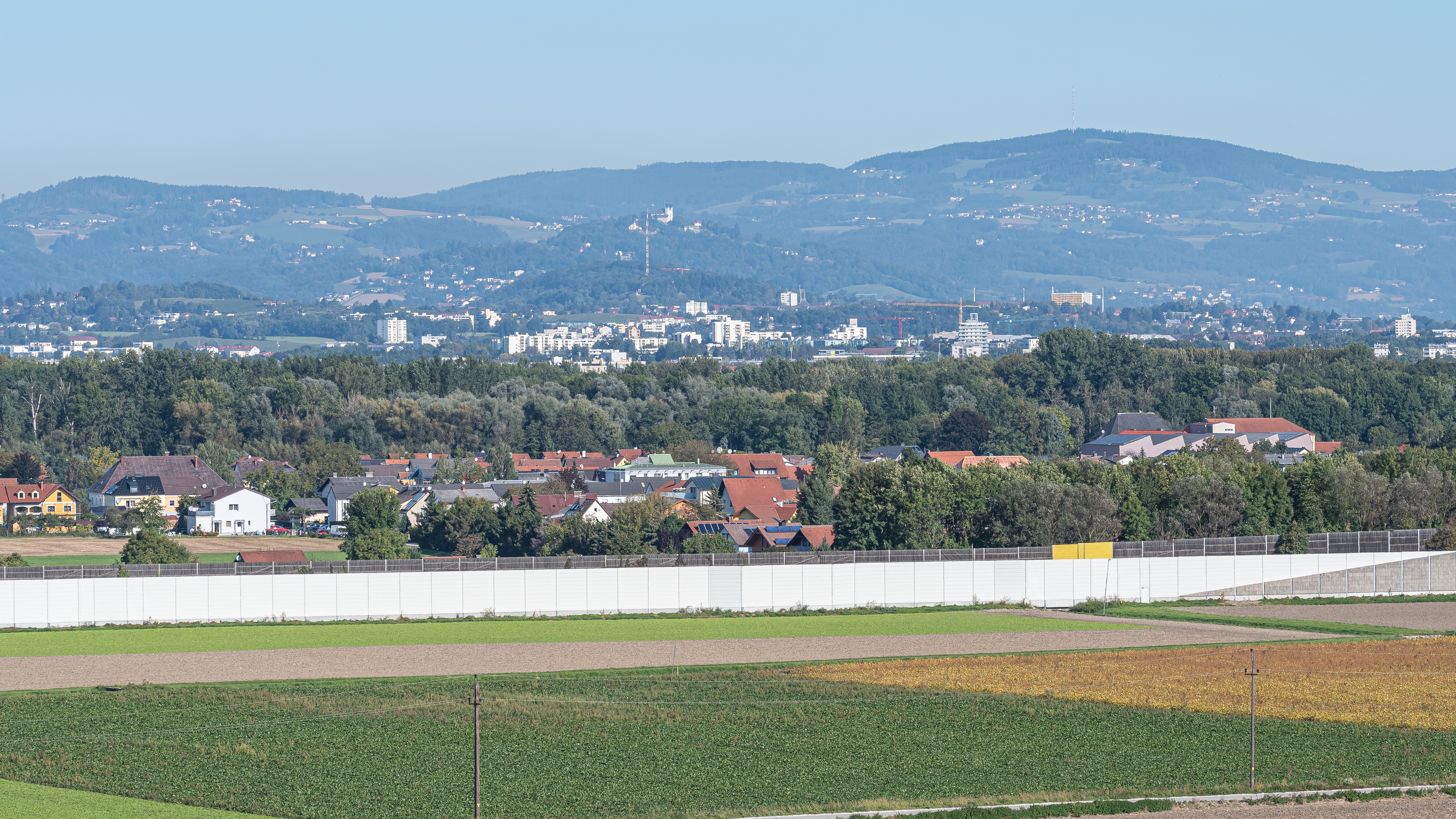 Linz, das Zentum des Oberösterreichischen Zentralraums; Standpunkt Vordermayrbergstraße, Blickrichtung 347,5° 'Q2011608' (Q2011608)